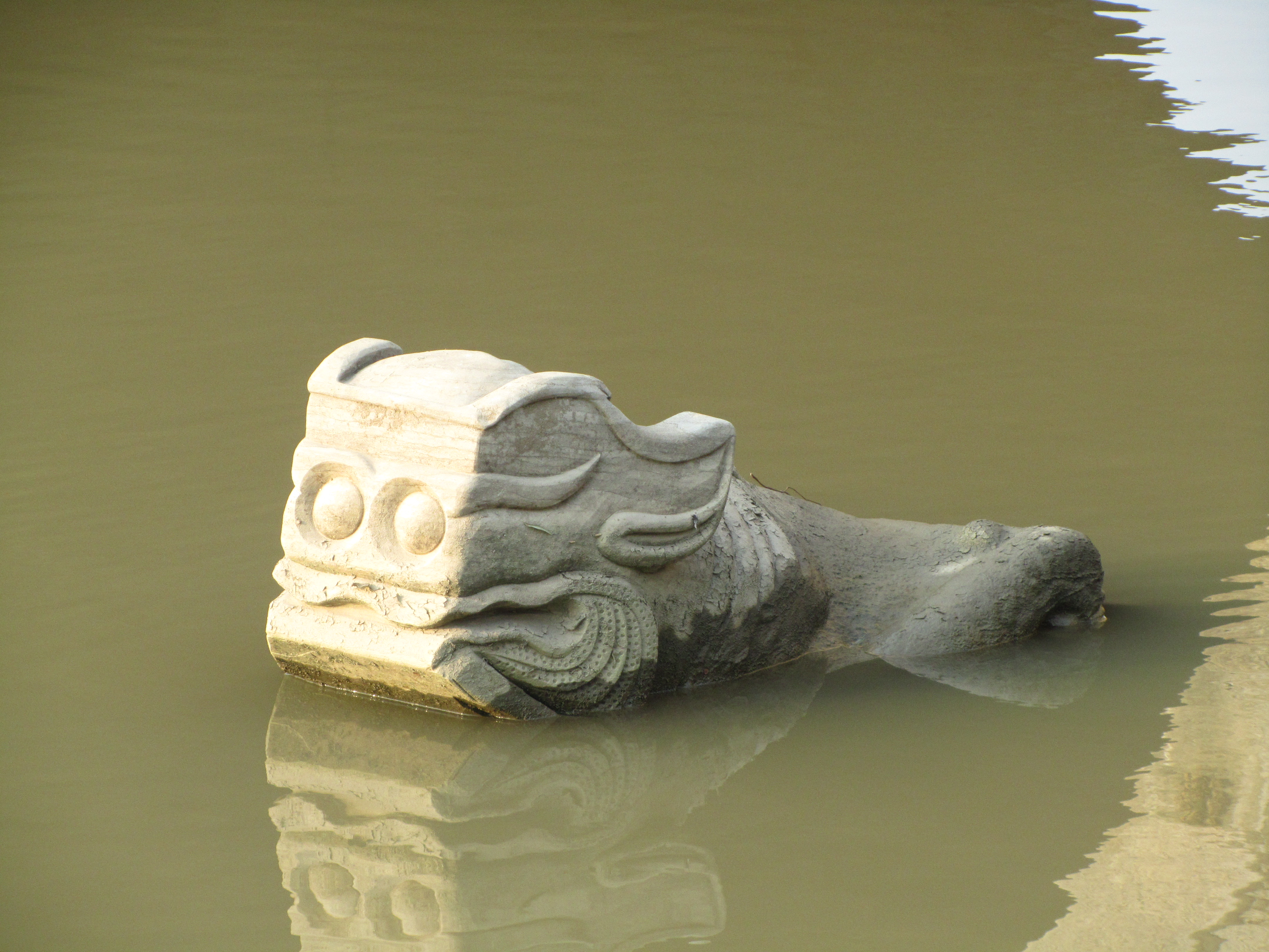 古桥七桥瓮上的分水兽。